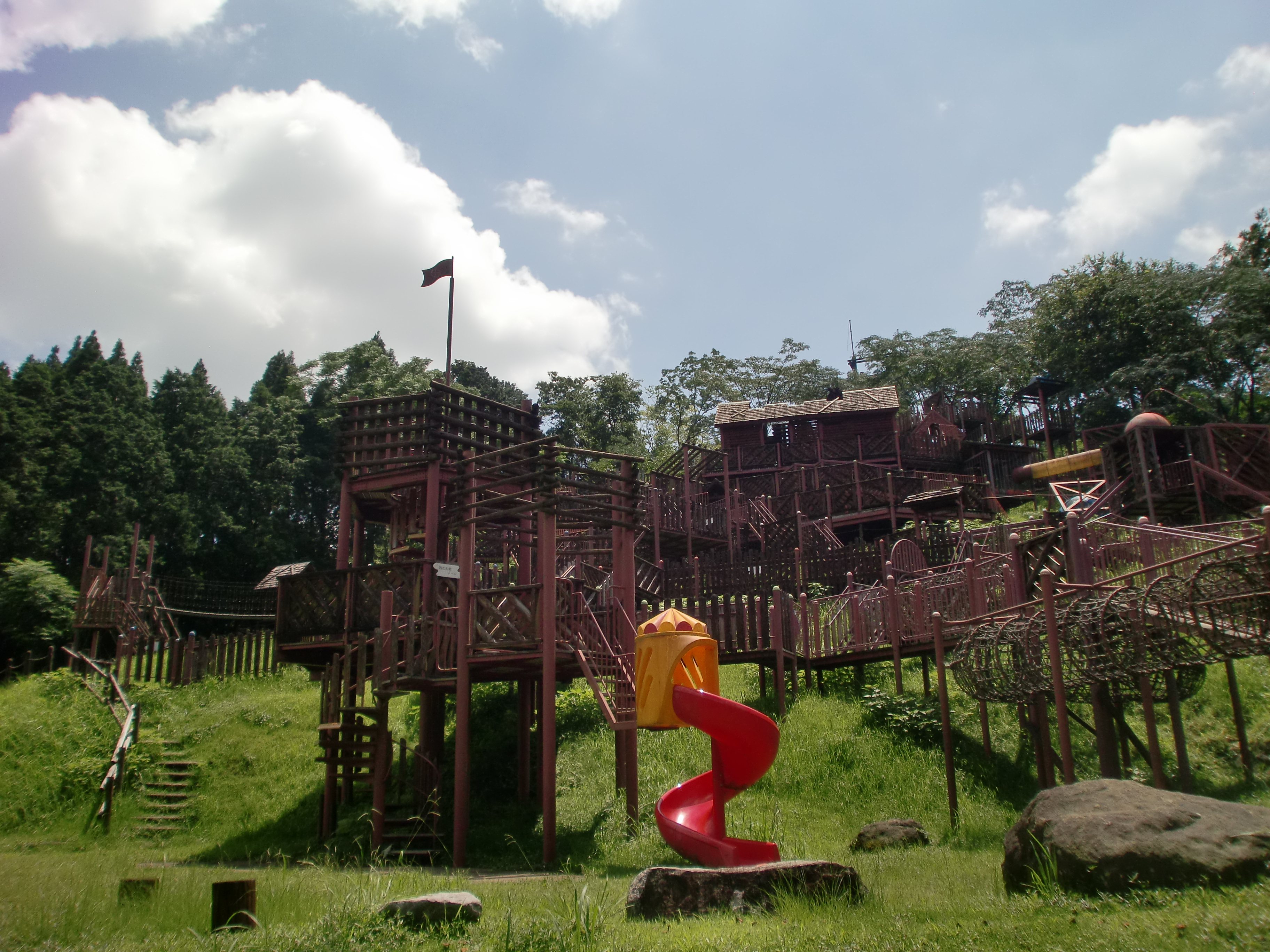 北薩広域公園の遊具